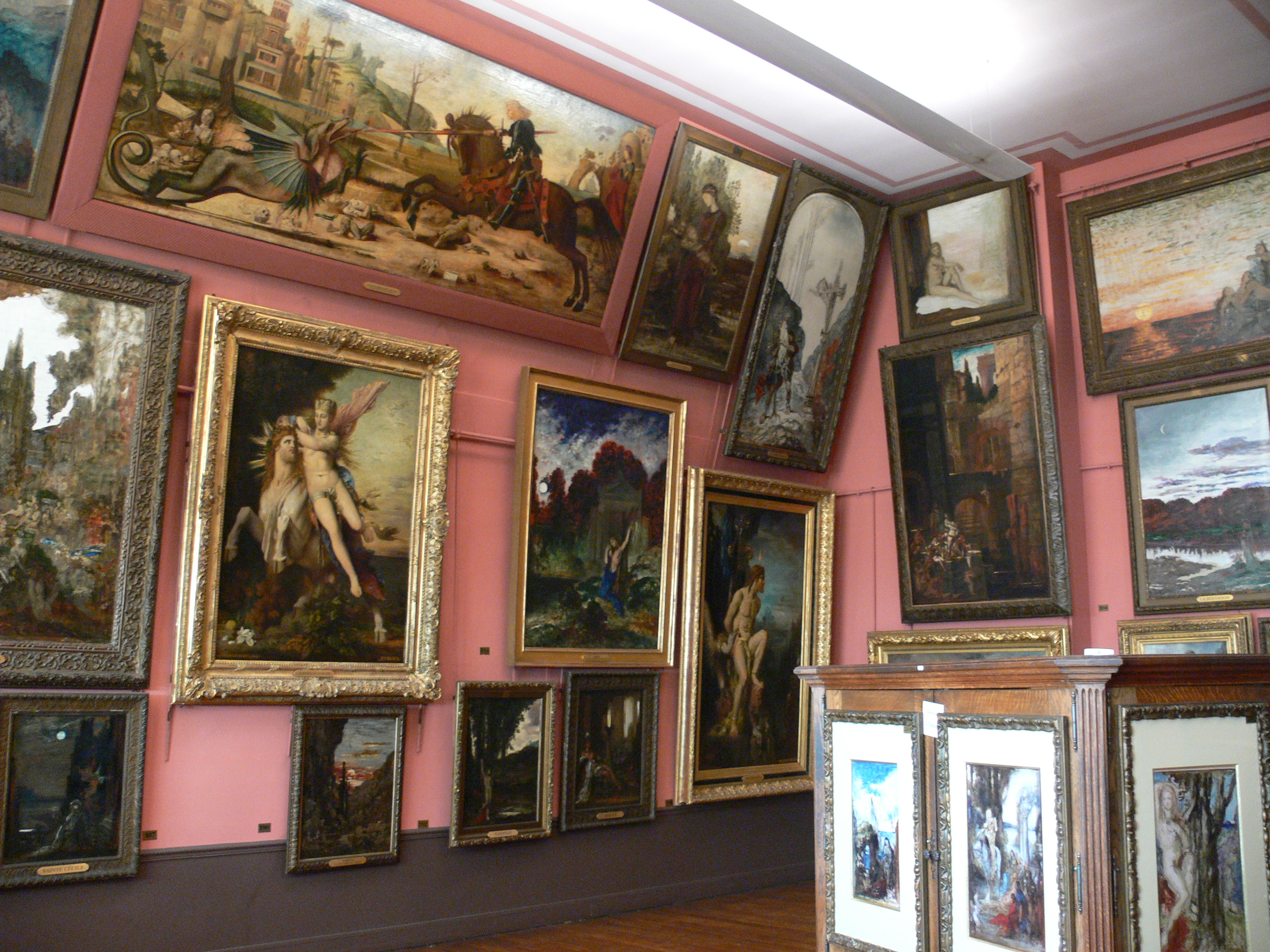 Musée national Gustave-Moreau, Paris